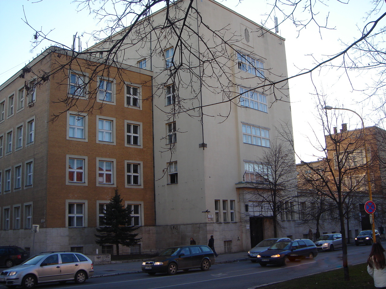 súčasný pohľad na budovu pošty